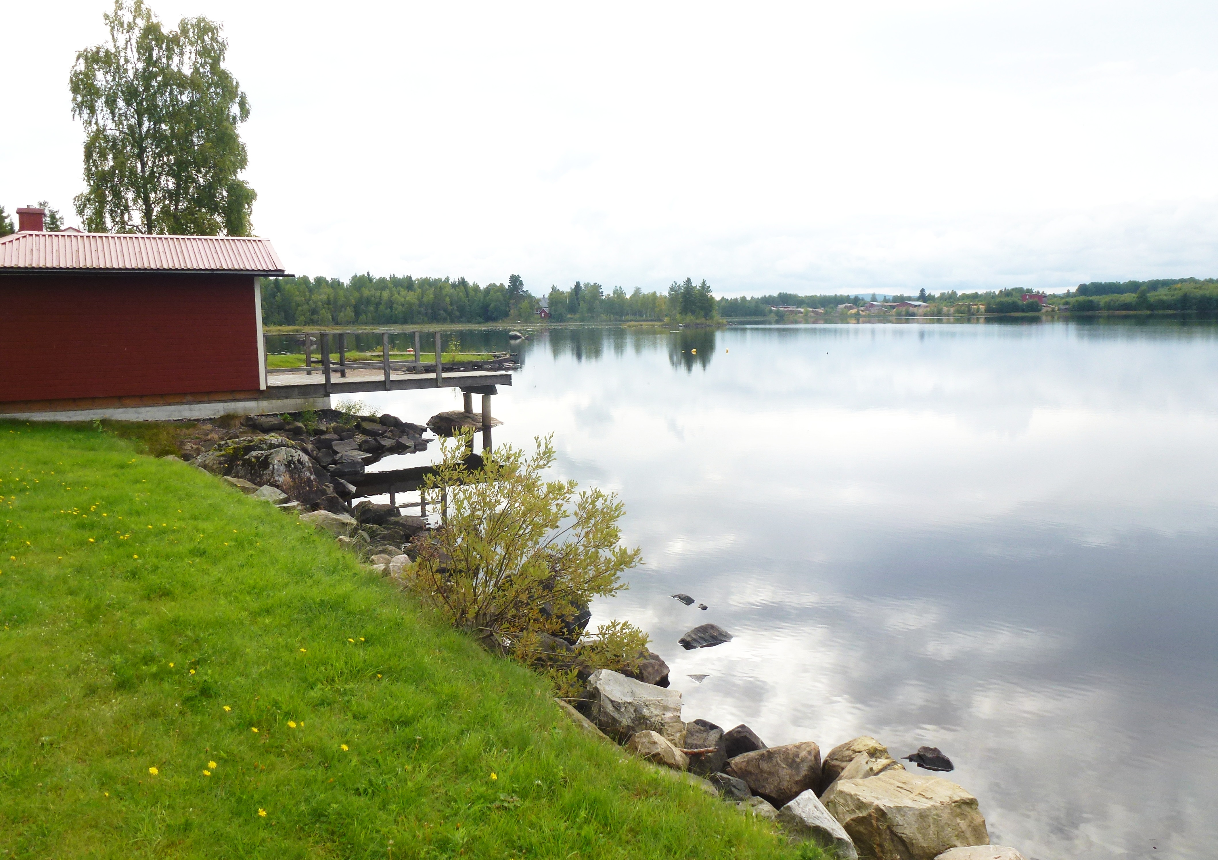 Kursgården Saxenborg, badstrand vid sjön Saxen